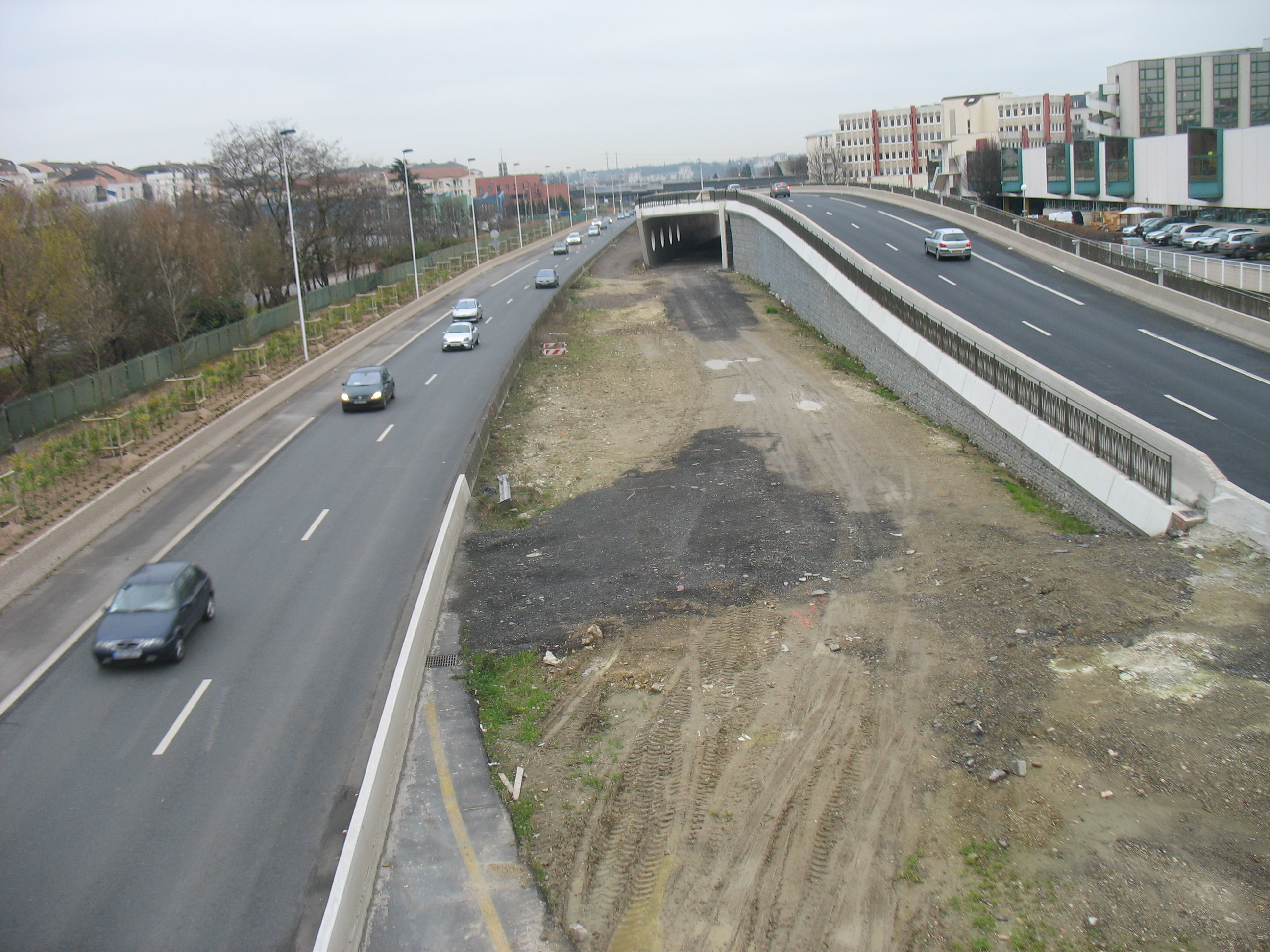 La voie routière RD1 passe au dessus des voies férres du prolongement de la ligne 8